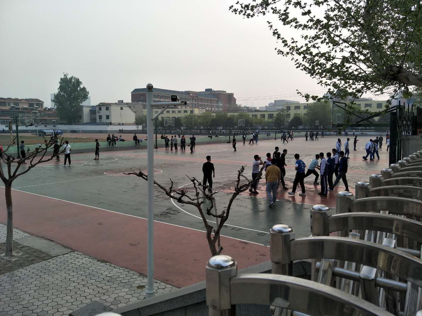 学校历史照片